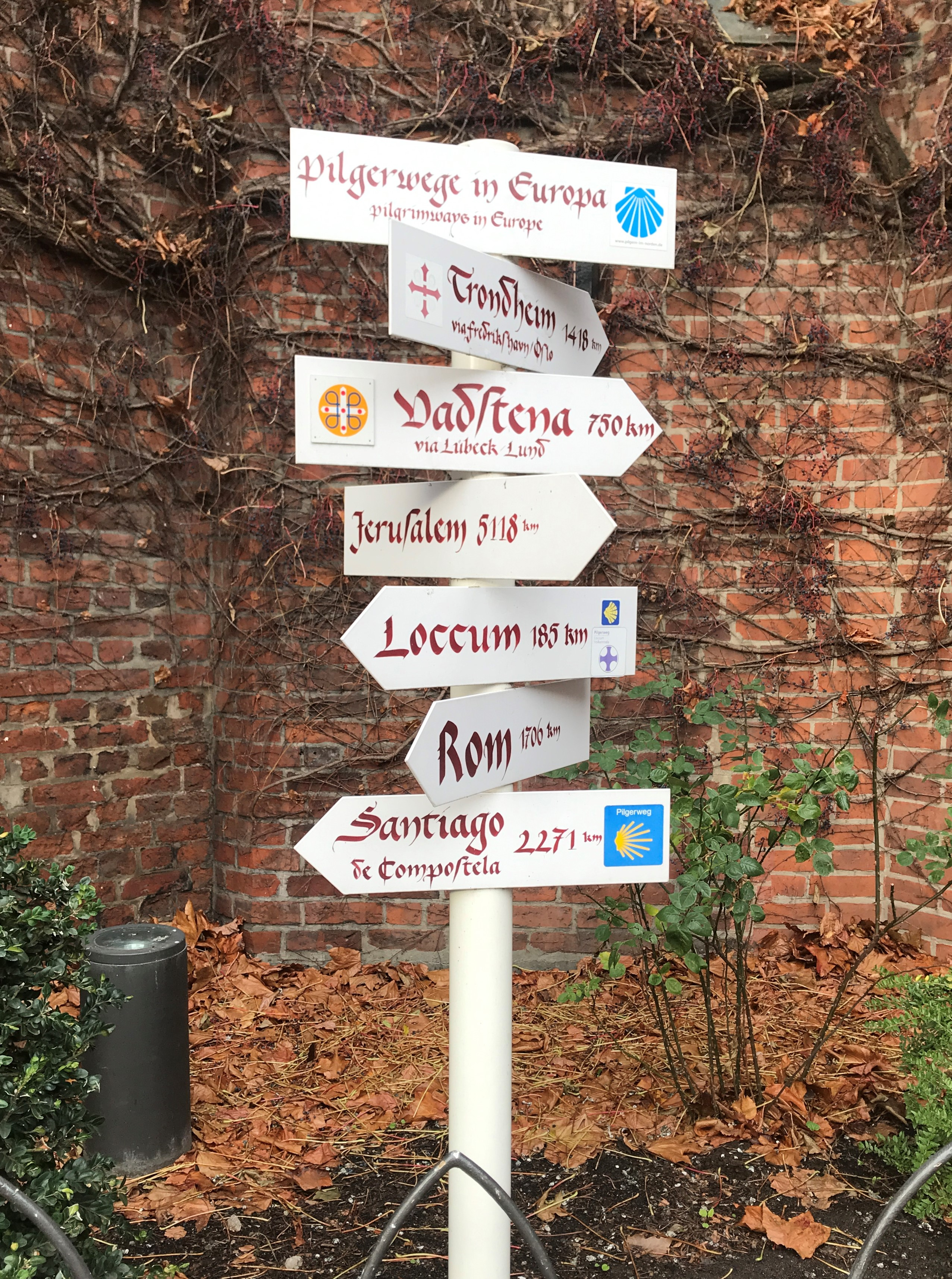 Cartel señalizador de distancias hasta los principales destinos de peregrinación. Está situado junto a la iglesia de Santiago (Hauptkirche Sankt Jacobi) en Hamburgo